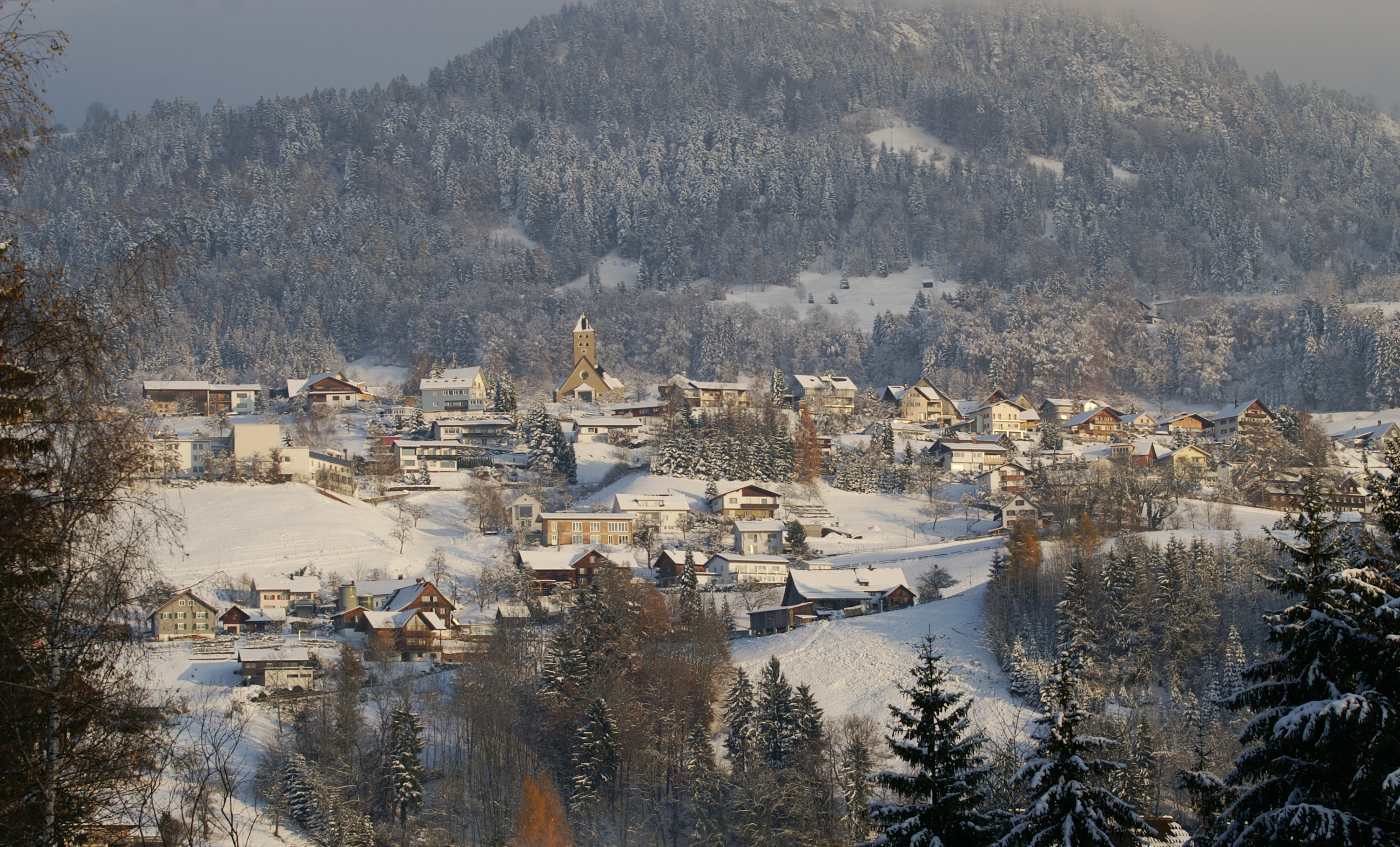 Blick von Sulz in Vorarlberg auf die Gemeinde Zwischenwasser